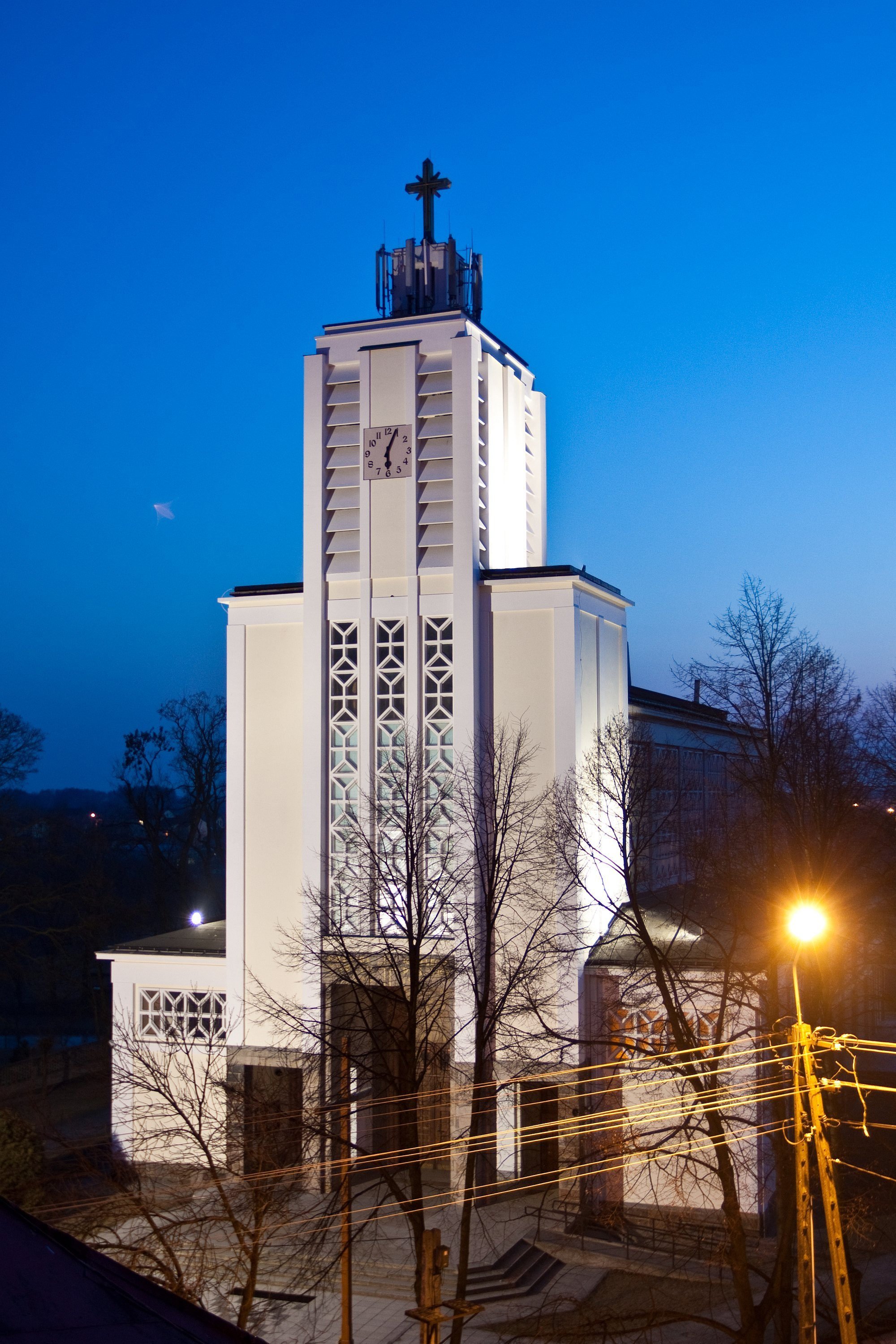 Odnowiony kościół w Gąbinie. Zdjęcie wykonano z dachu ratusza - siedziby Urzędu Miasta i Gminy w Gąbinie.